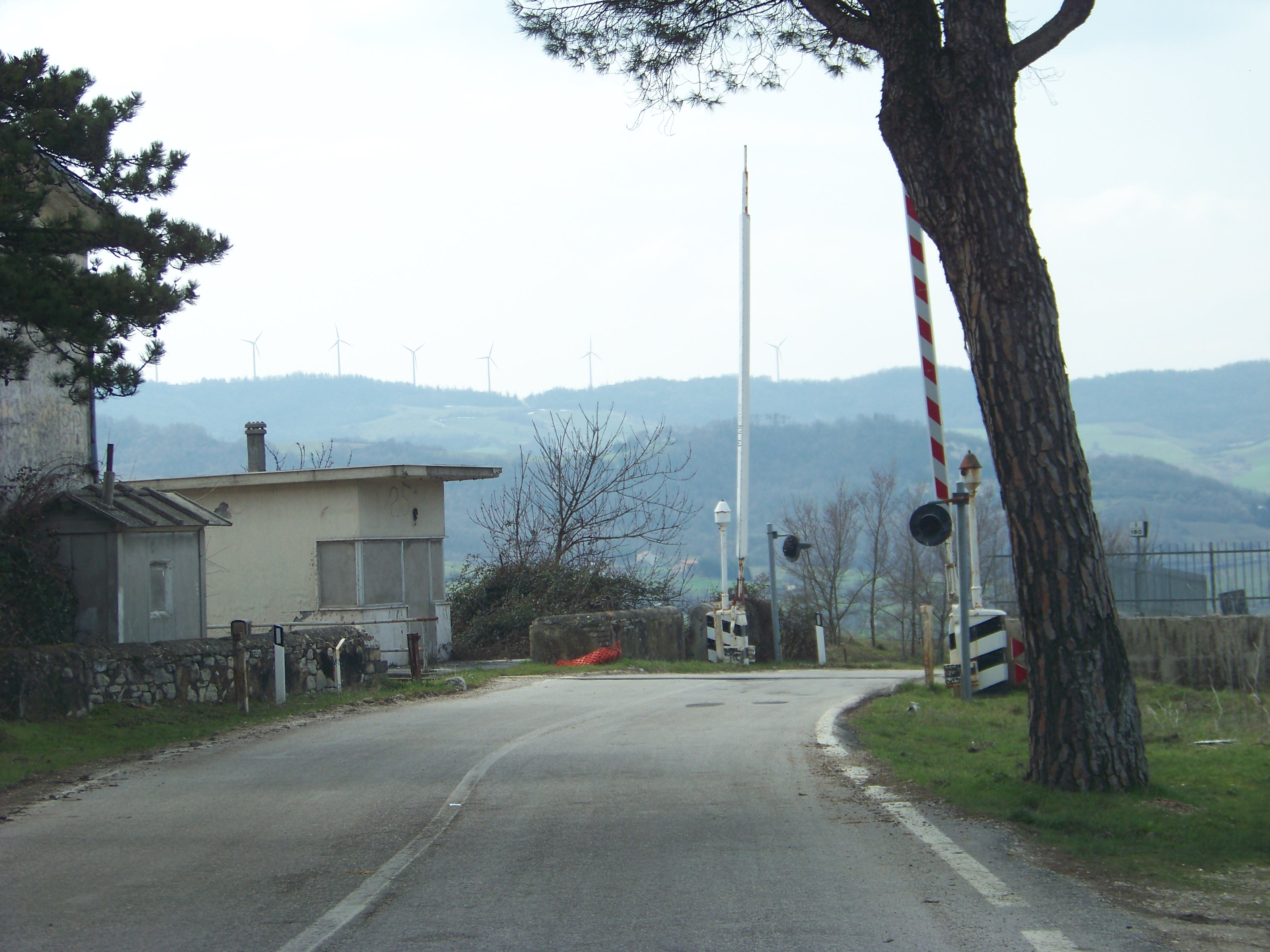 Passaggio a livello della SS 87 alla ferrovia Campobasso-Termoli, nel territorio comunale di Casacalenda